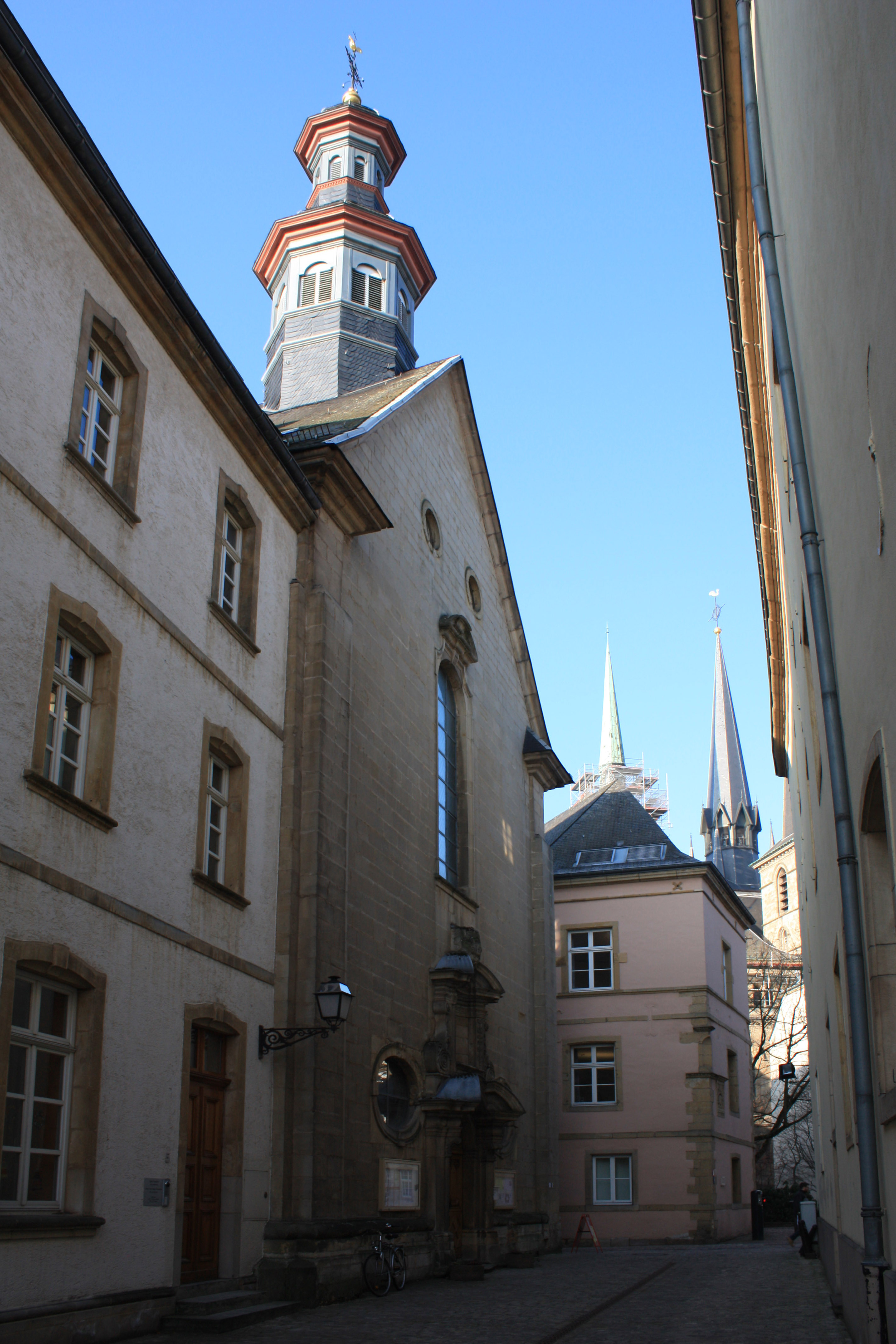 eege Foto